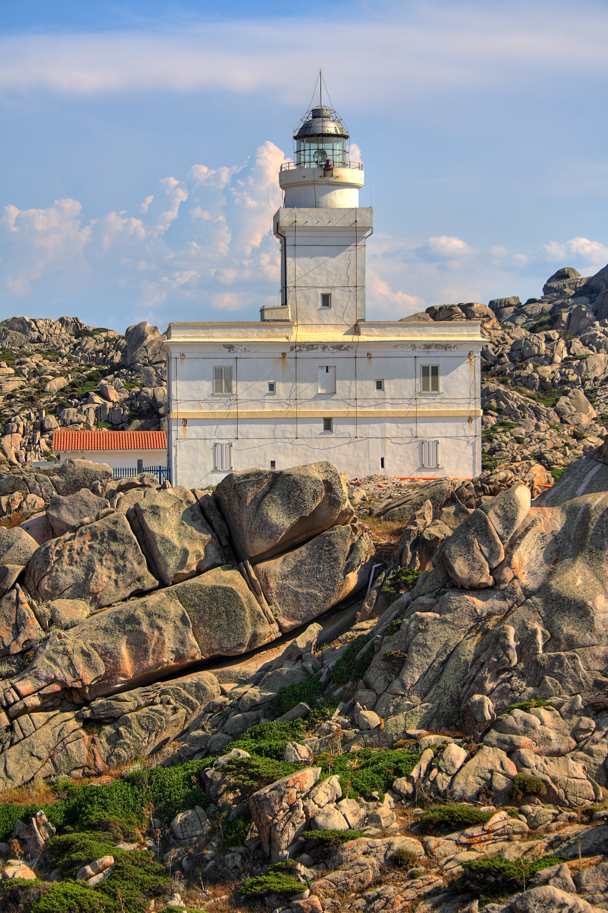 Faro di Capo Testa - Santa Teresa di Gallura